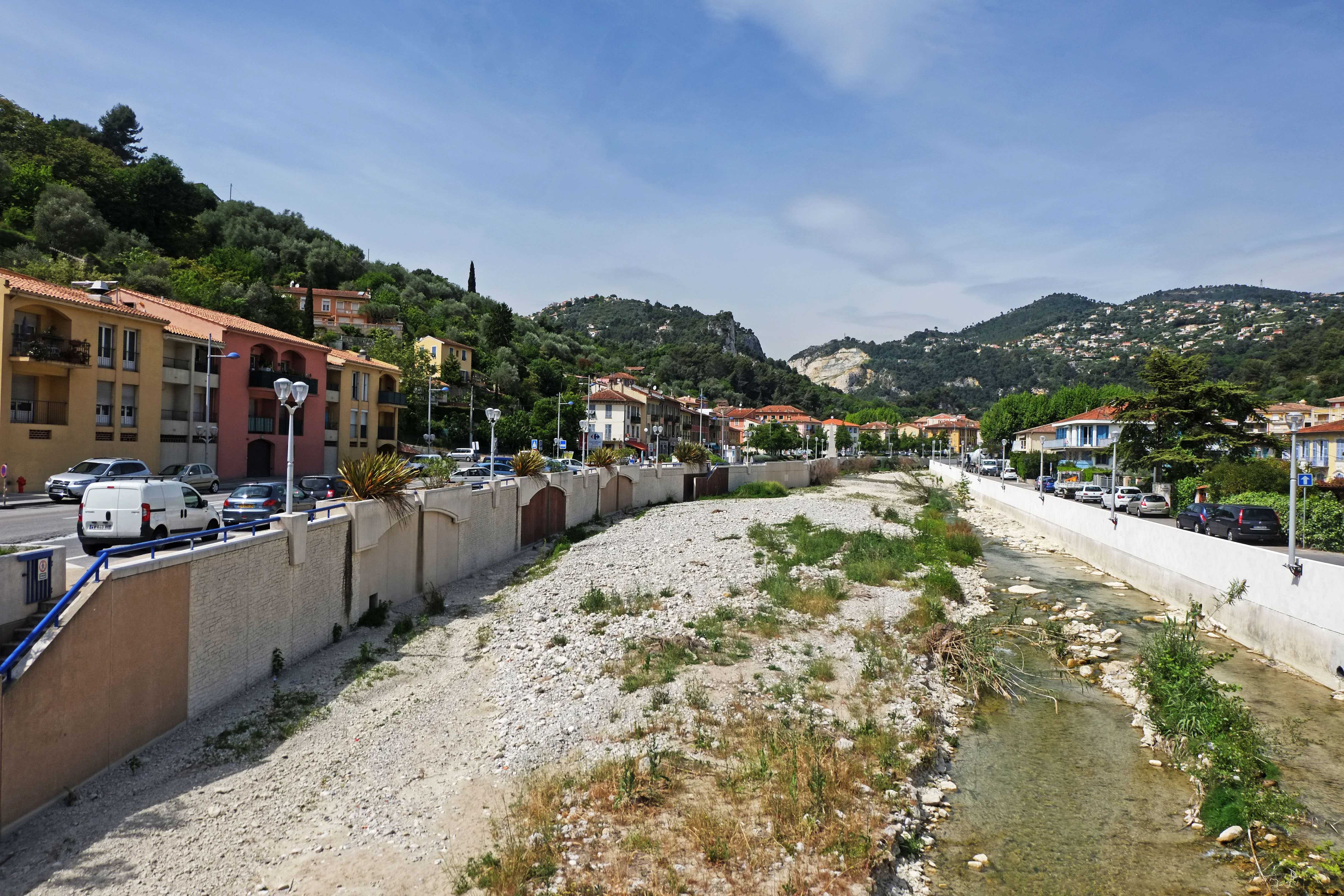 Vue du village de Saint-André-de-la-Roche traversé par la Banquière